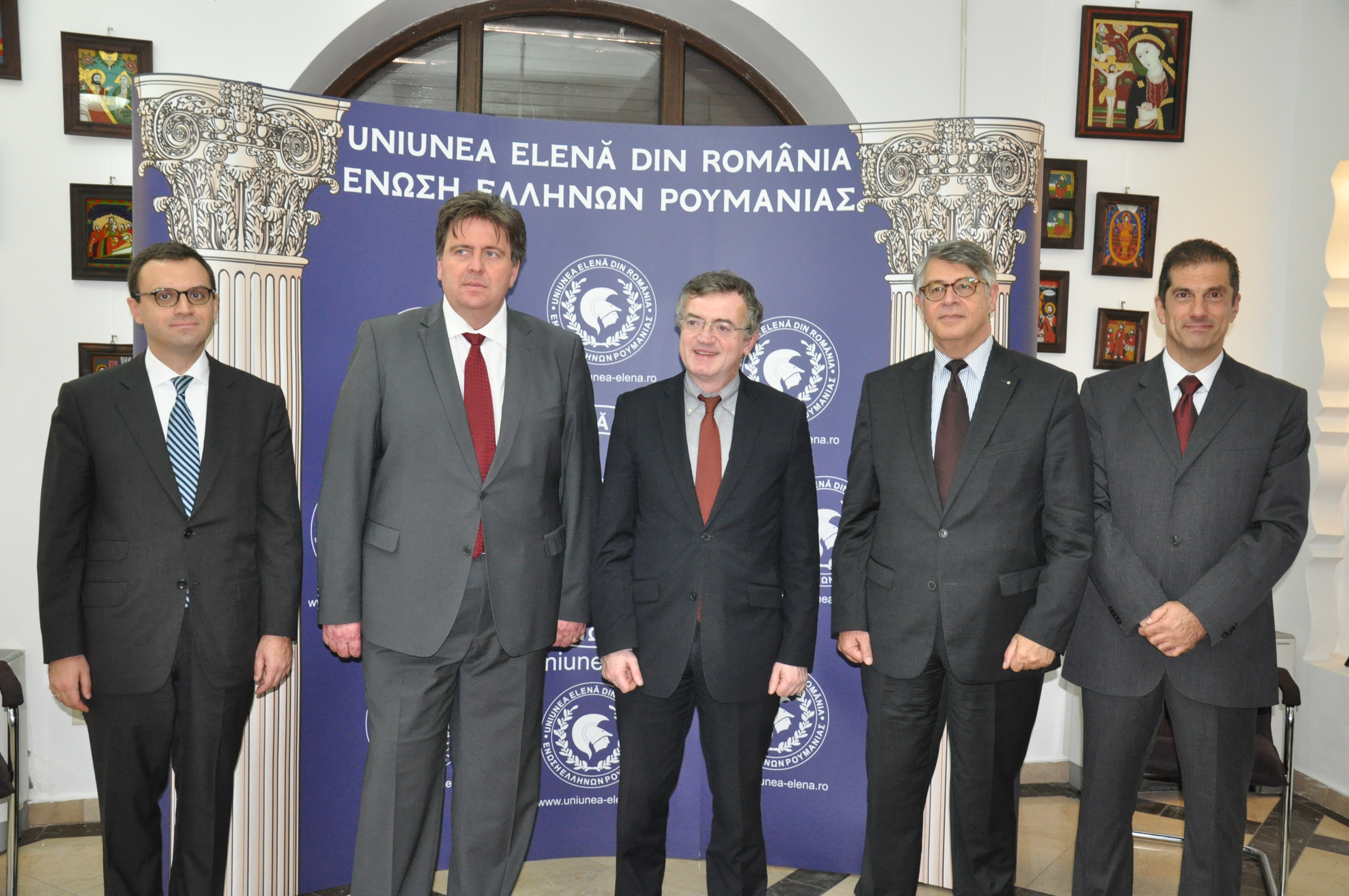 Ο Υφυπουργός Εξωτερικών, Κυριάκος Γεροντόπουλος, εγκαινίασε σήμερα το πρωί, Τρίτη 21 Οκτωβρίου, το νέο κτίριο του Ελληνικού Σχολείου «Αθηνά» (Νηπιαγωγείο-Δημοτικό-Γυμνάσιο), στο πλαίσιο της διήμερης επίσκεψής του στη Ρουμανία.